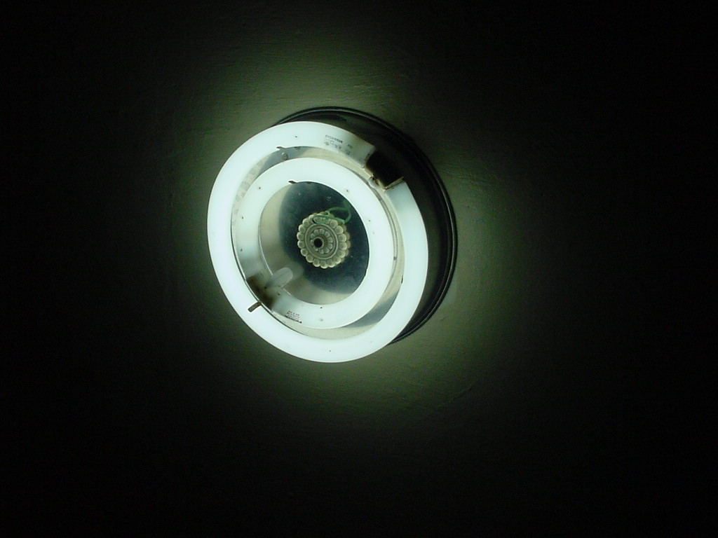 Una nueva luz a seguir...